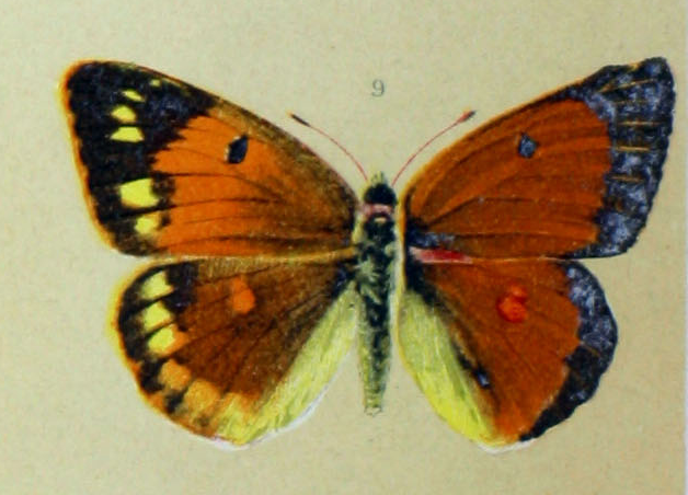 Colias aurorina heldreichi Arnold Spuler: Die Schmetterlinge Europas. 3, E. Schweitzerbartsche Verlagsbuchhandlung, Stuttgart 1910.